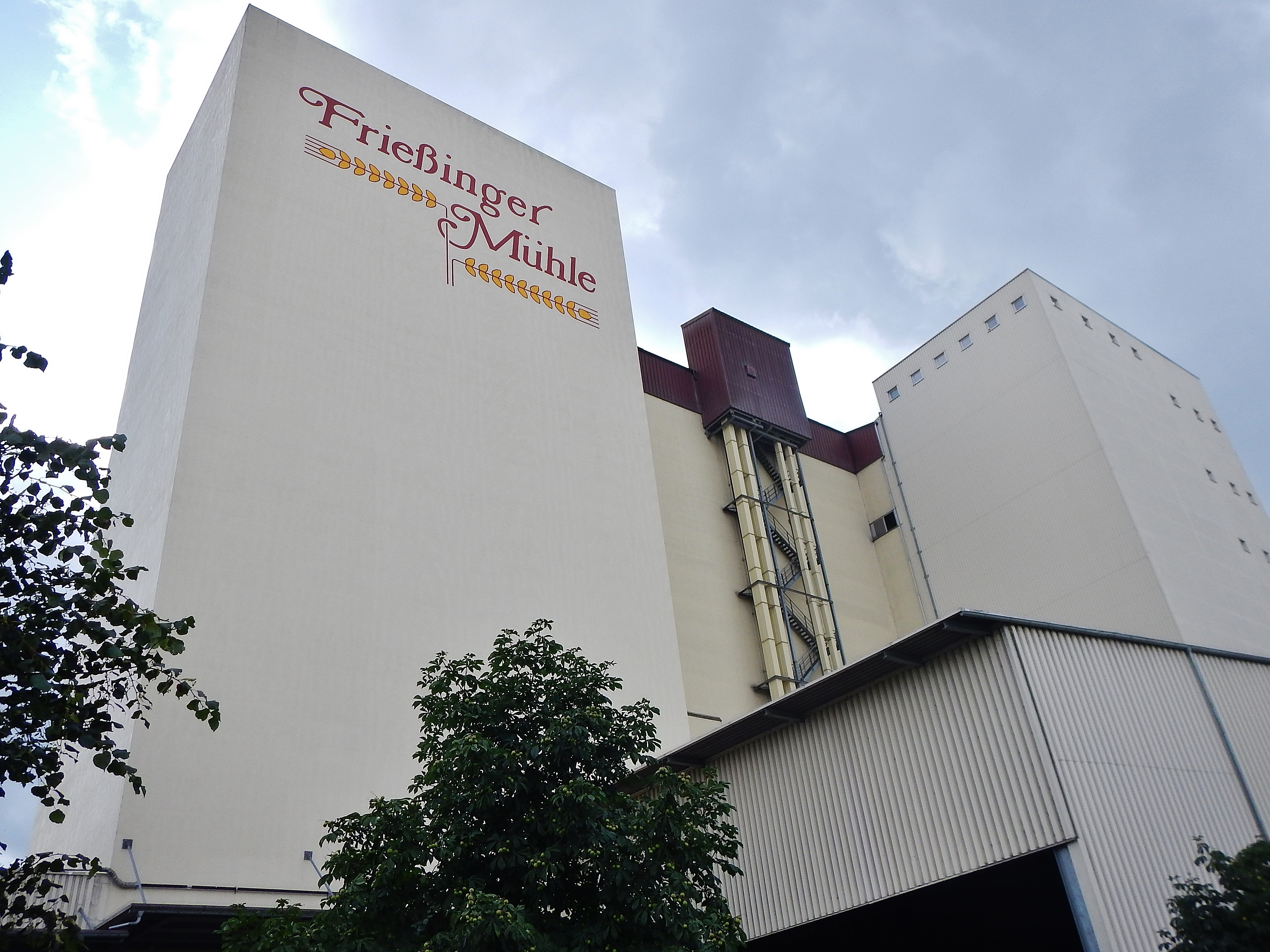 Beim 366 km langen Neckartalradweg: Frießinger Mühle